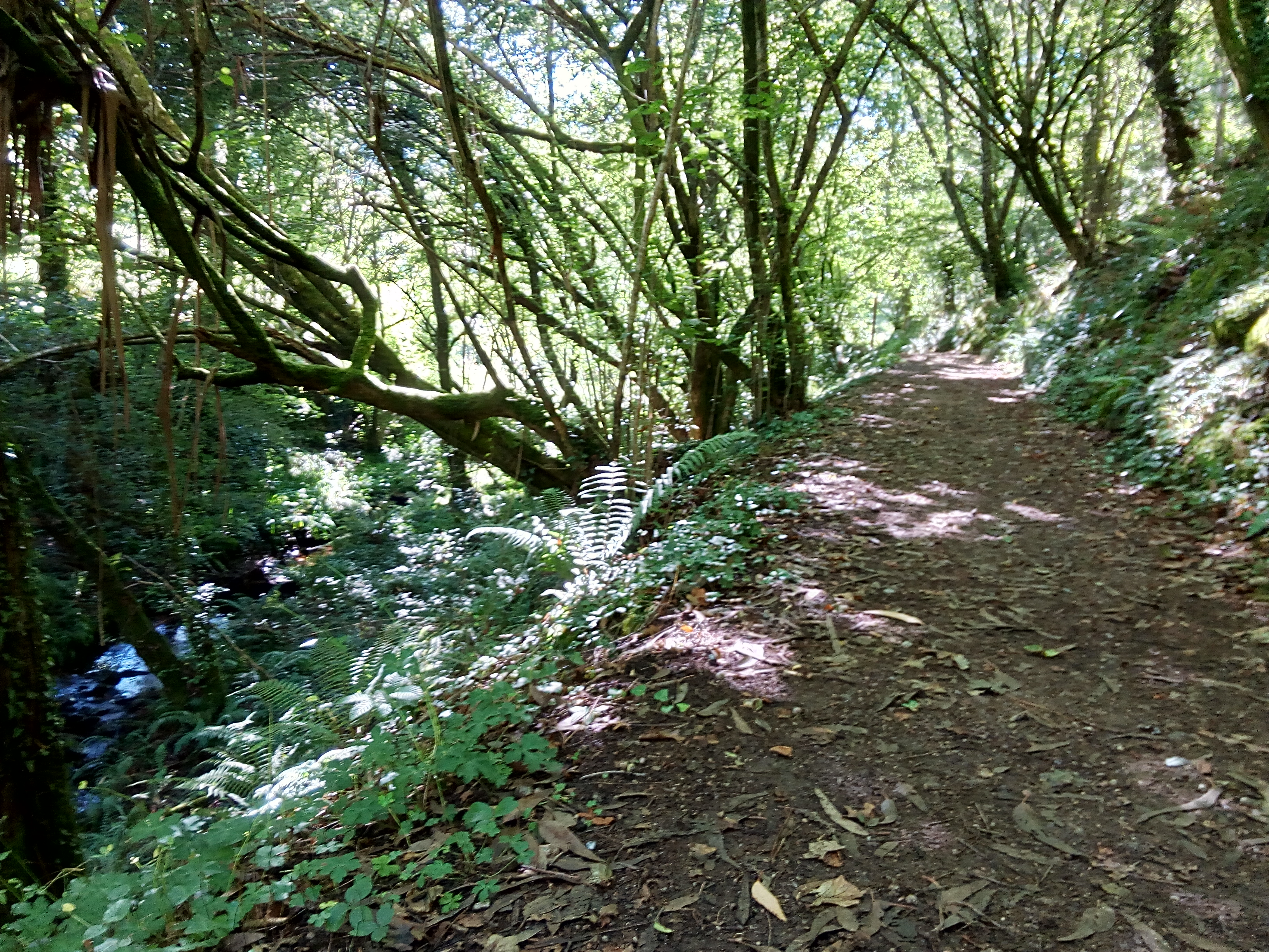 Vigoko Bembrive auzoan atera da argazki hau, zehazki, Eifonso errekaren basabidean. Leku hau aipatutako basabidearen mendialdeko zatian kokatuta dago, ezkerrean Eifonso erreka ikusi dezakegu. Argazkia abuztuko egun bateko goizean atera zen.